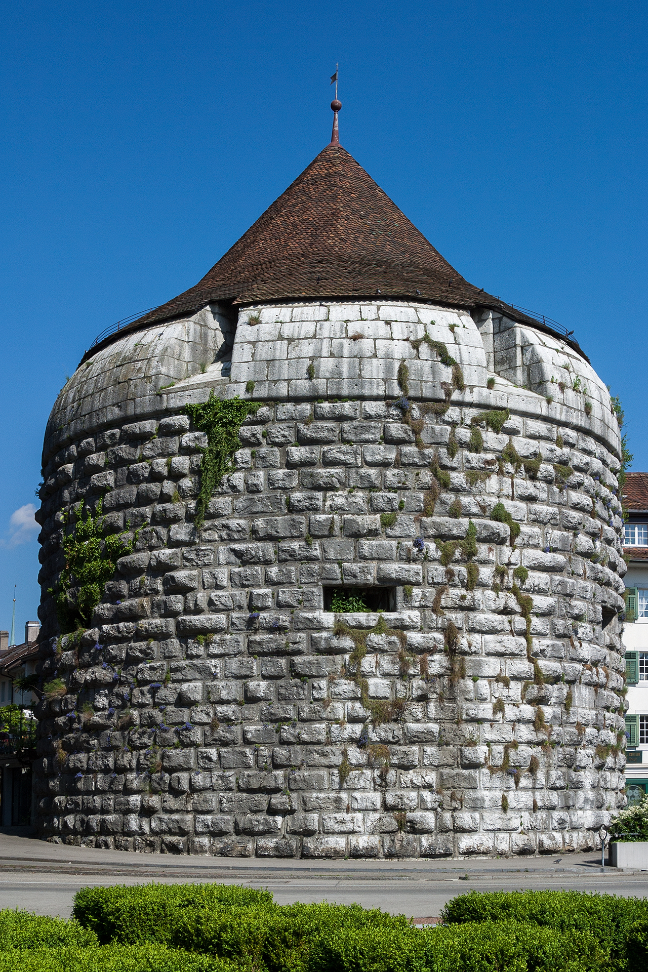 Burriturm in Solothurn